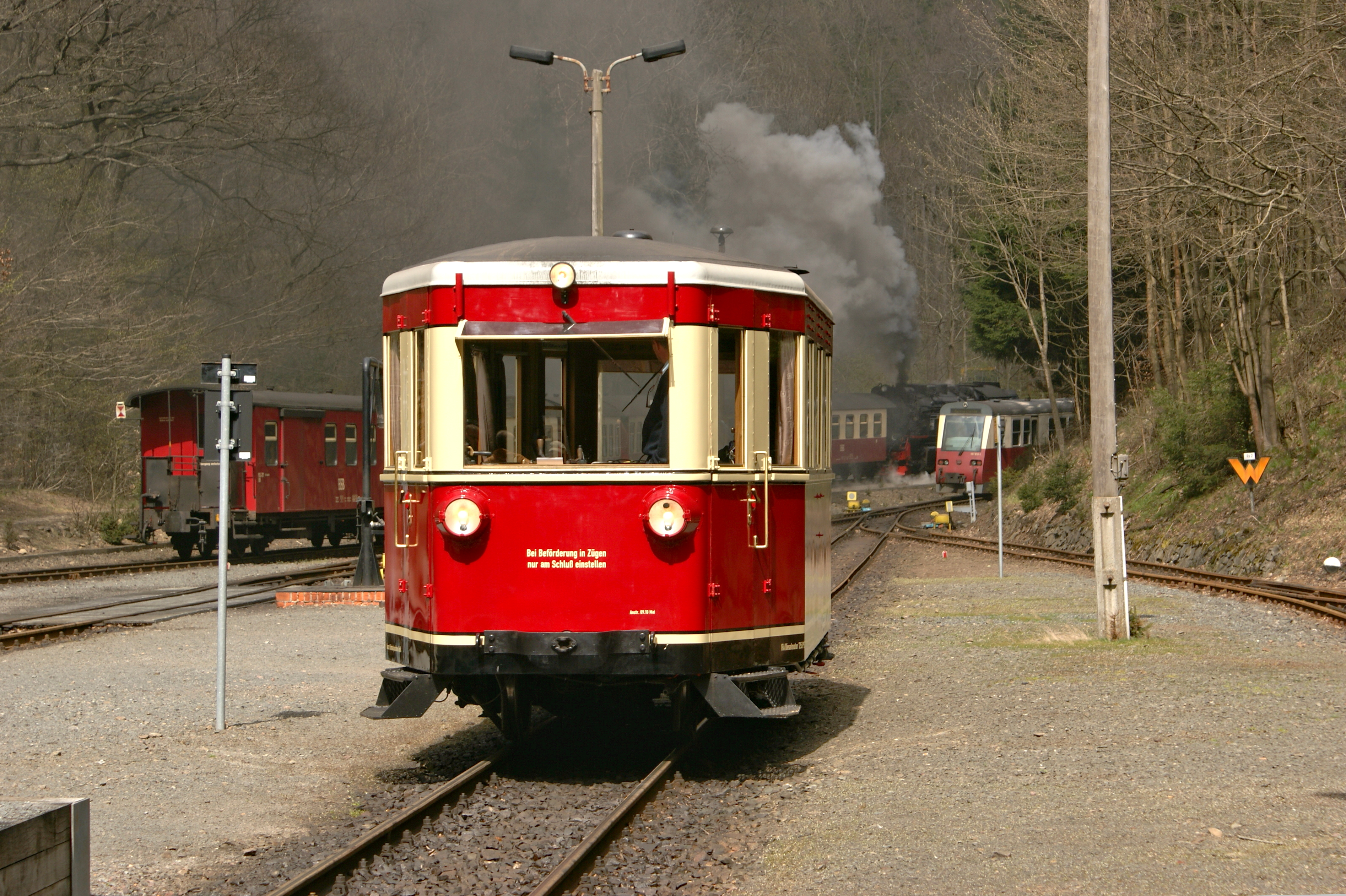 Der Triebwagen 187 001 (ex GHE T 1) im Bahnhof Eisfelder Talmühle der HSB am 21.April 12